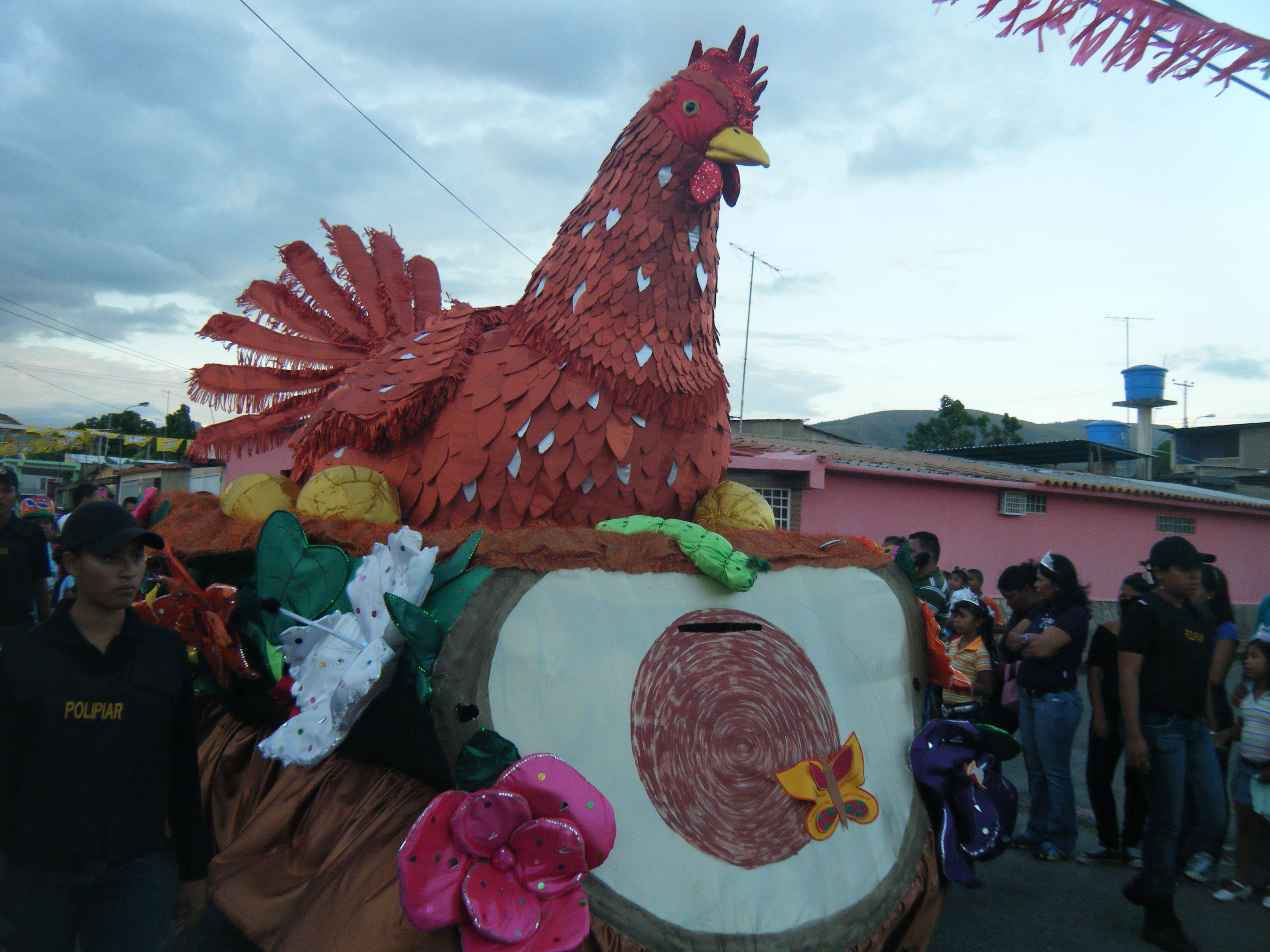 Carrosa de Gallina en carnavales de Aragua de Maturin. Estado Monagas.